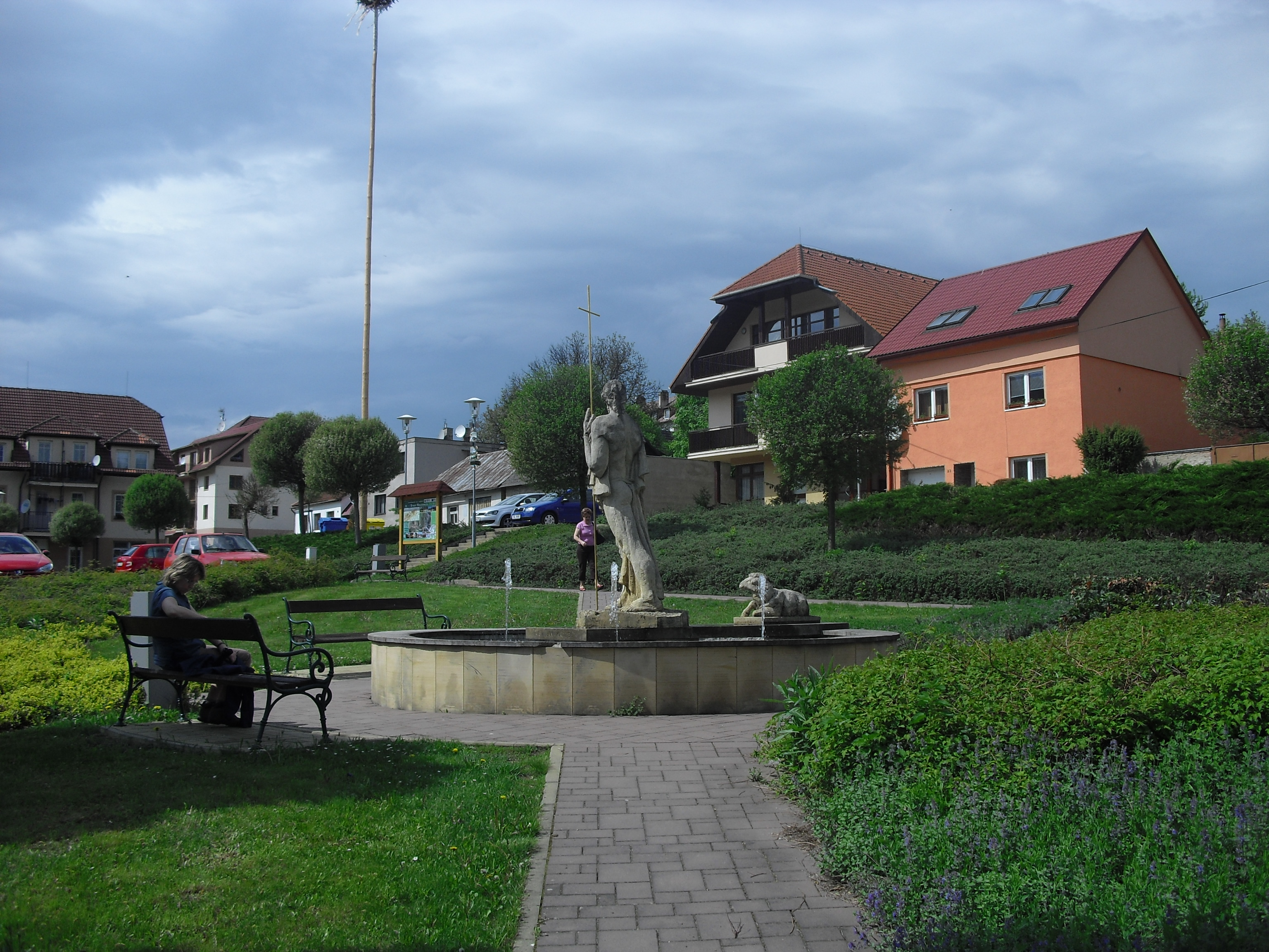 Starý Hrozenkov